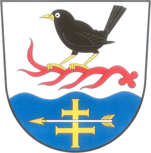 znak, Hartvíkovice, okres Třebíč